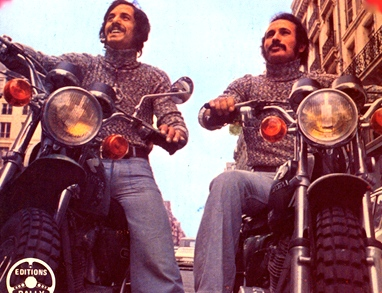 Rachid et Fethi, duo de chanteurs et producteurs algériens.